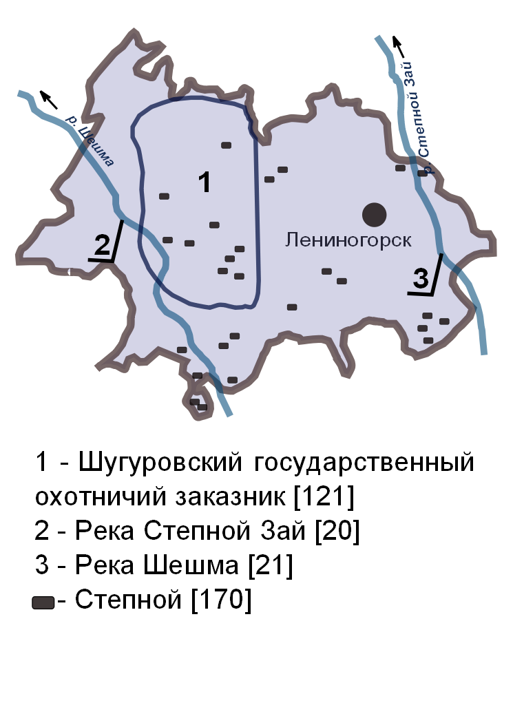 Схема расположения особо охраняемых природных территорий Лениногорского муниципального района в соответствии с постановлением Кабинета Министров Республики Татарстан от 24 июля 2009 г. N 520.